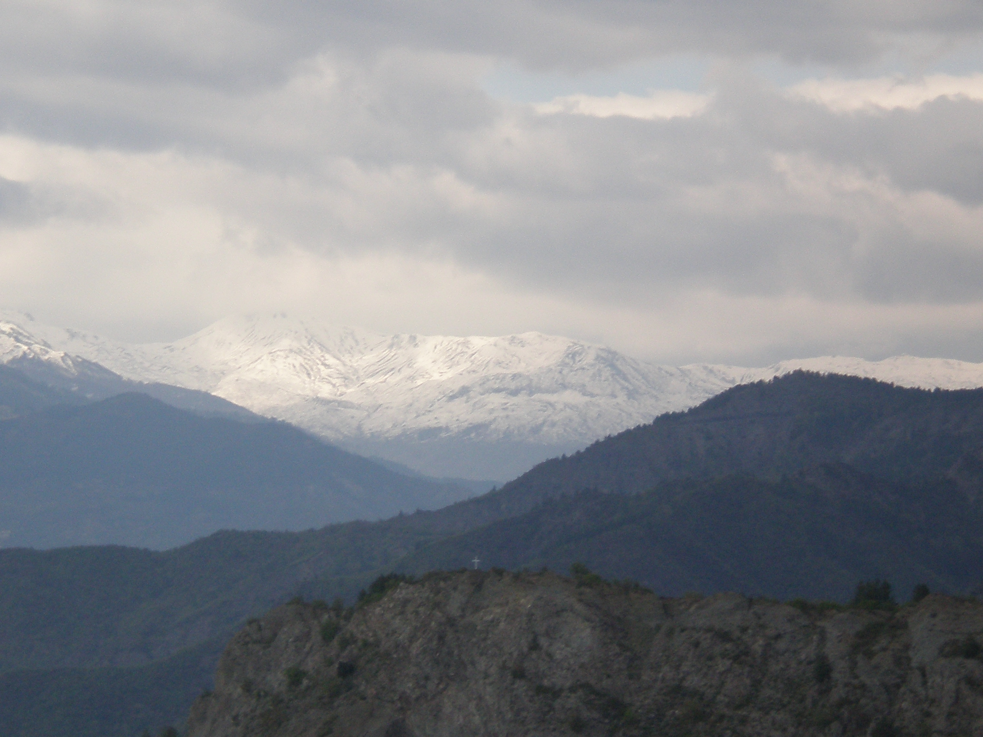 Πρόκειται για τον χιονισμένο ορεινό όγκο στο βάθος (η φωτογραφία λήφθηκε από τη Μόλιστα Ιωαννίνων το Πάσχα του 2008)